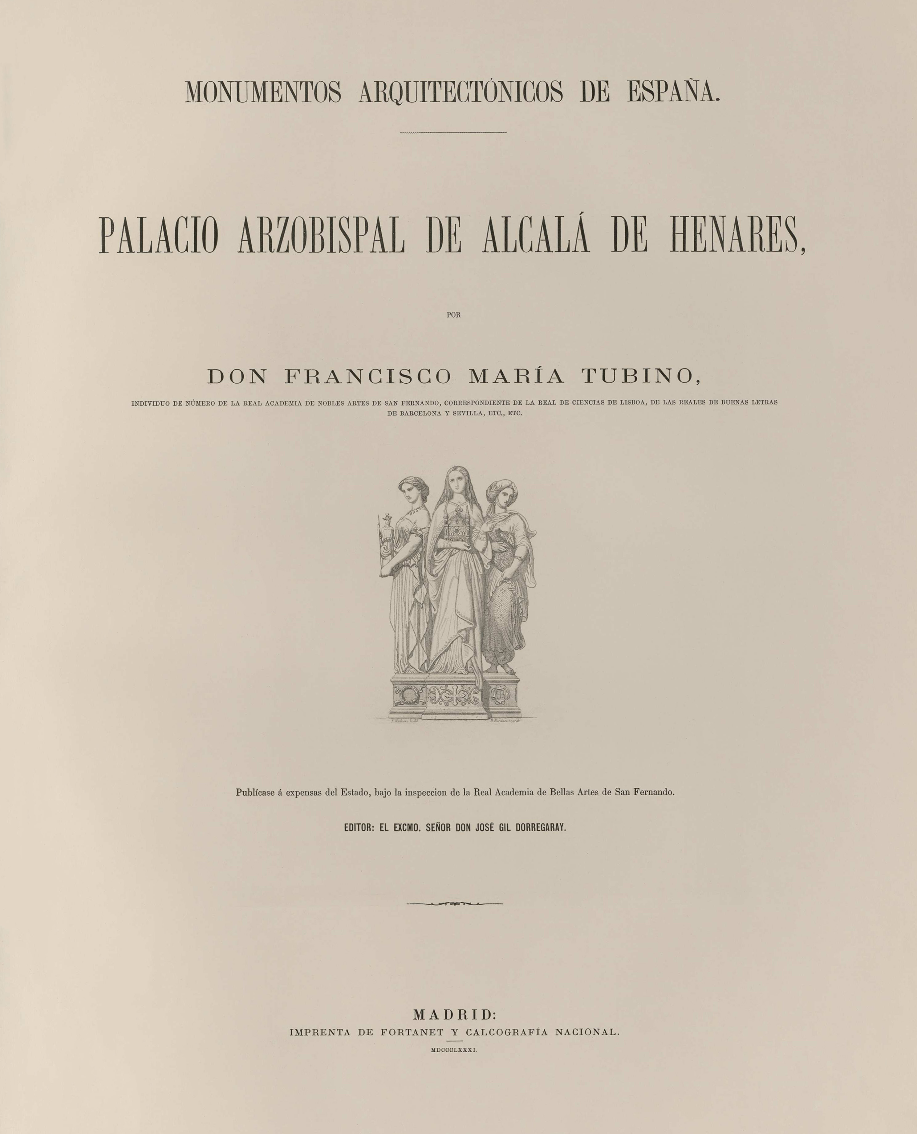 Portada del libro "Palacio Arzobispal de Alcalá de Henares", dentro de la colección ilustrada "Monumentos Arquitectónicos de España". Publicado por Francisco María Tubino en Madrid, en 1881.